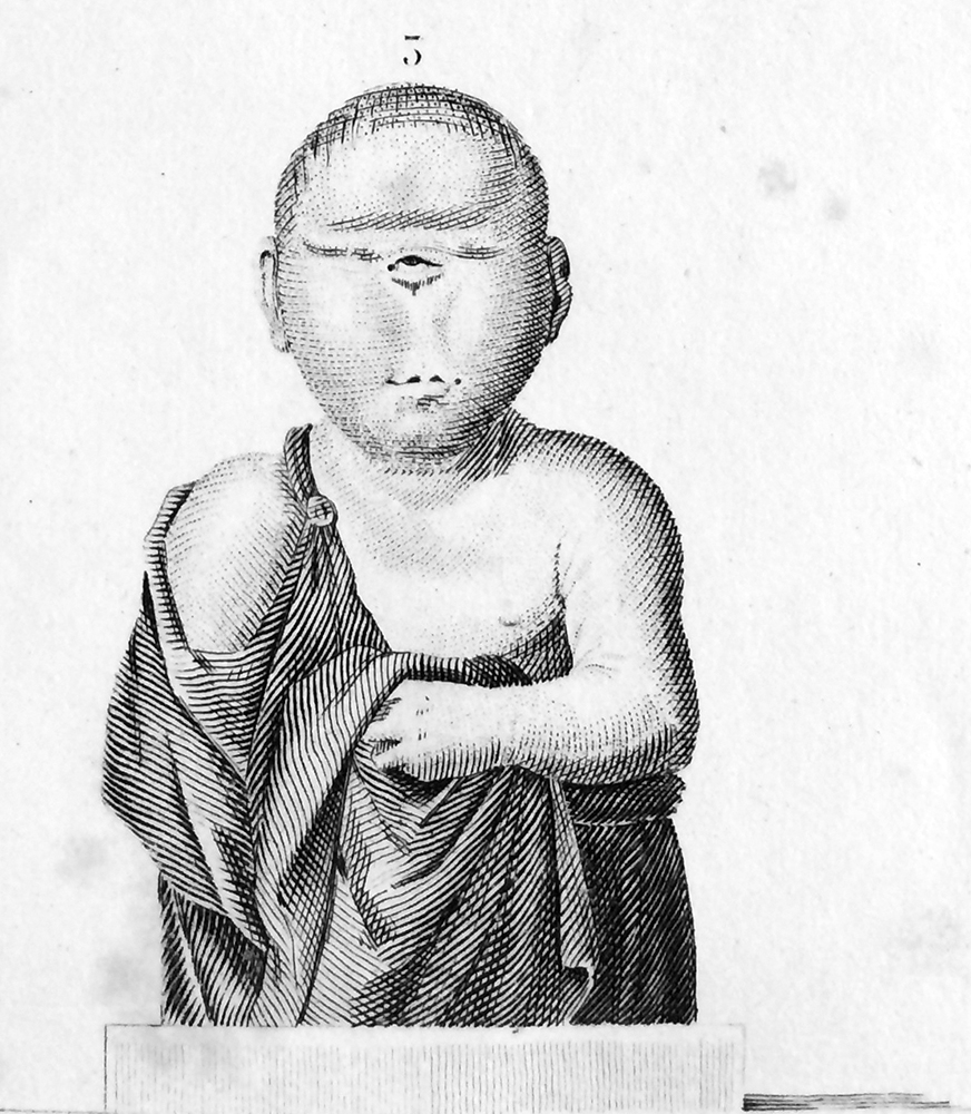 Planche de l'ouvrage "De l'Homme" de Buffon dans "Oeuvres Complètes - 1837